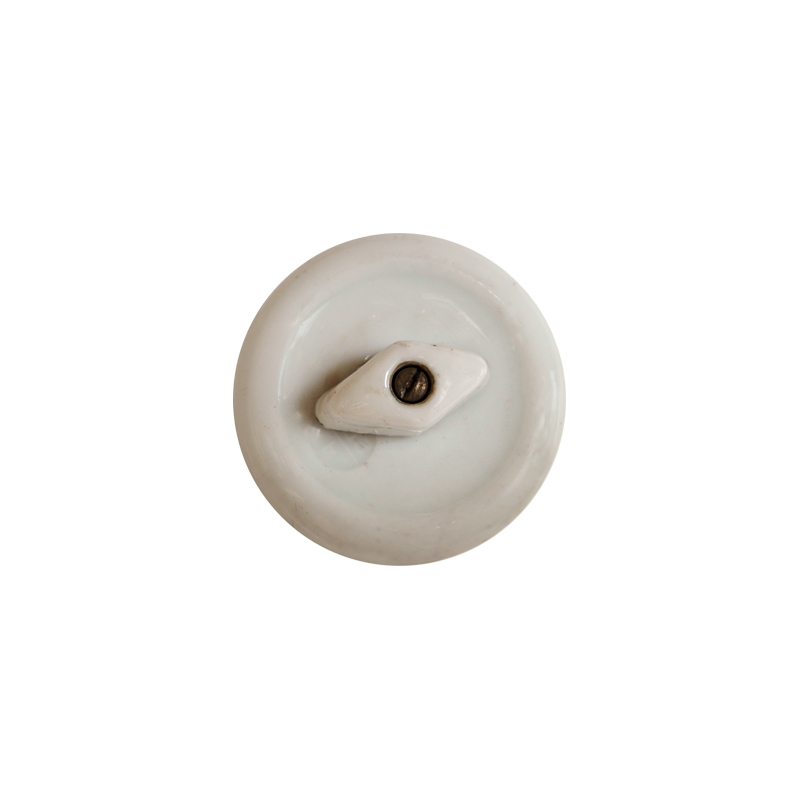 Wyłącznik pokrętny porcelanowy, 1931 rok.